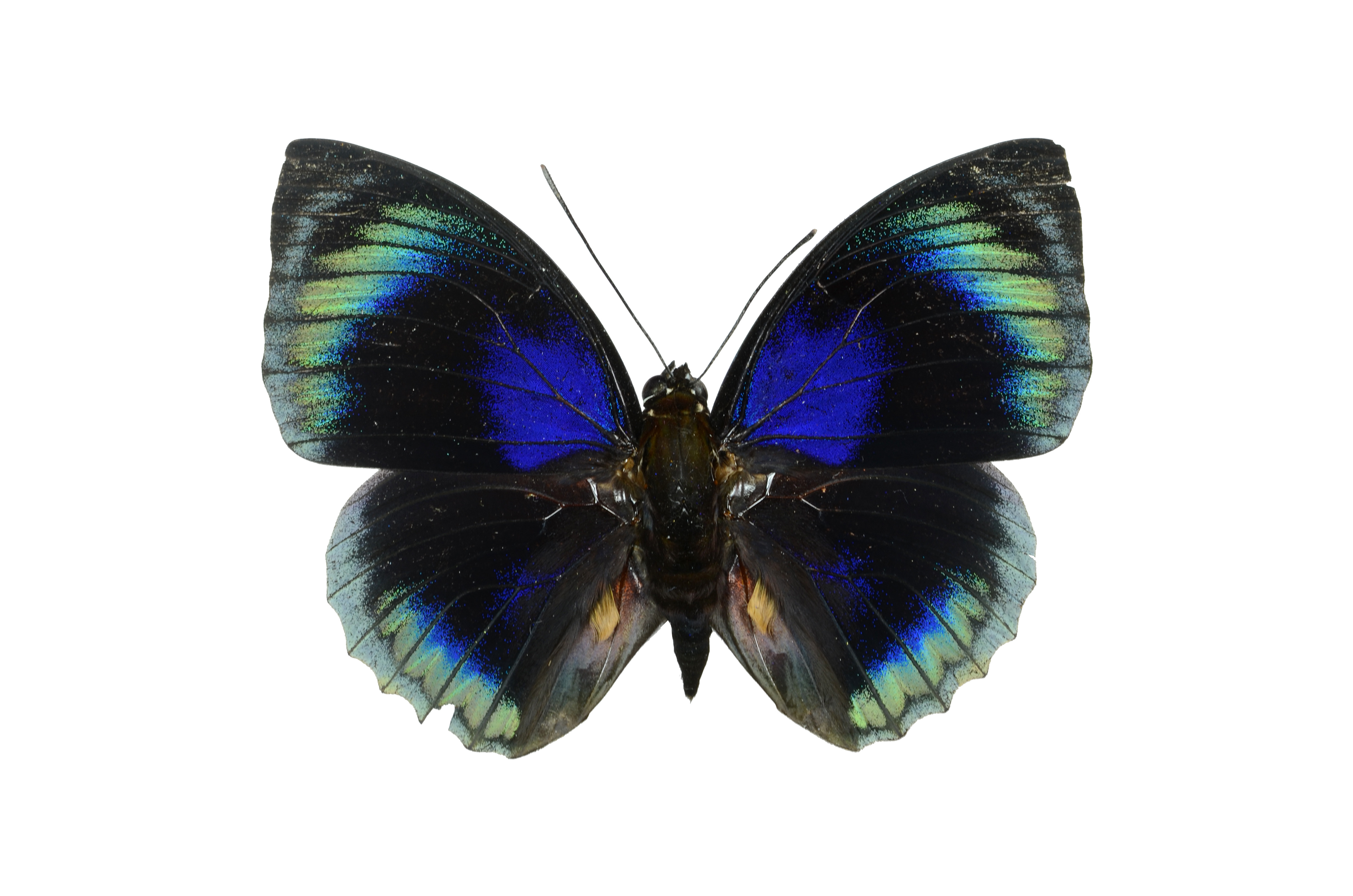 Agrias hewitsonius d